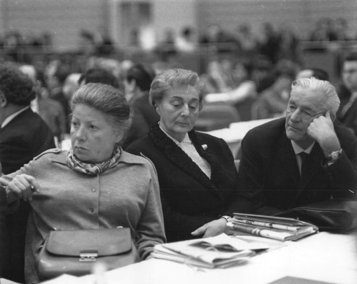 Zentralbild Franke 2.11.1966 Berlin: 1. Jahreskonferenz des Deutschen Schriftstellerverbandes Lilly Becher, Hedda Zinner und Fritz Erpenbeck (v.l.n.r.) als aufmerksame Zuhörer während der 1. Jahreskonferenz des Deutschen Schriftstellerverbandes. Vom 2. bis 4.11. 1966 beraten über 350 Schriftsteller, junge Autoren, schreibende Arbeiter, Literaturwissenschaftler und Bibliothekare in der Kongreßhalle am Berliner Alexanderplatz über die Probleme der sozialistischen Literaturentwicklung.